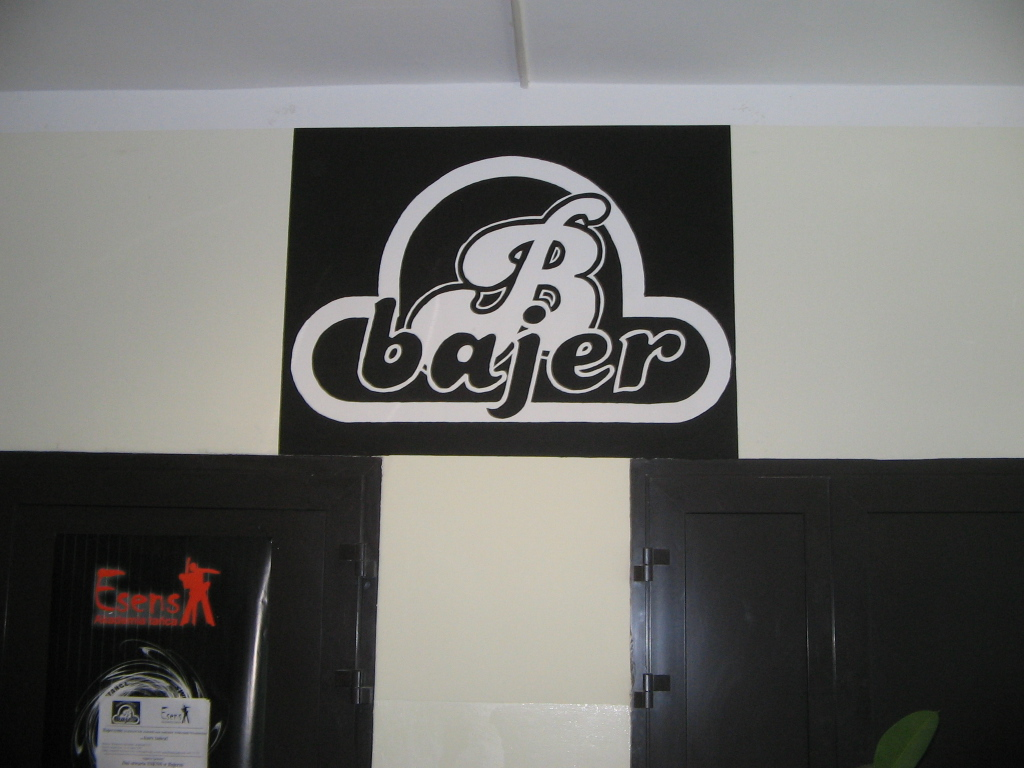 Wittigowo (Wrocław) - Klub Studencki Bajer.